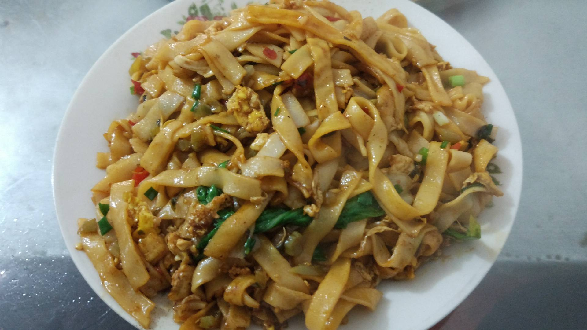 鸡蛋炒宽粉